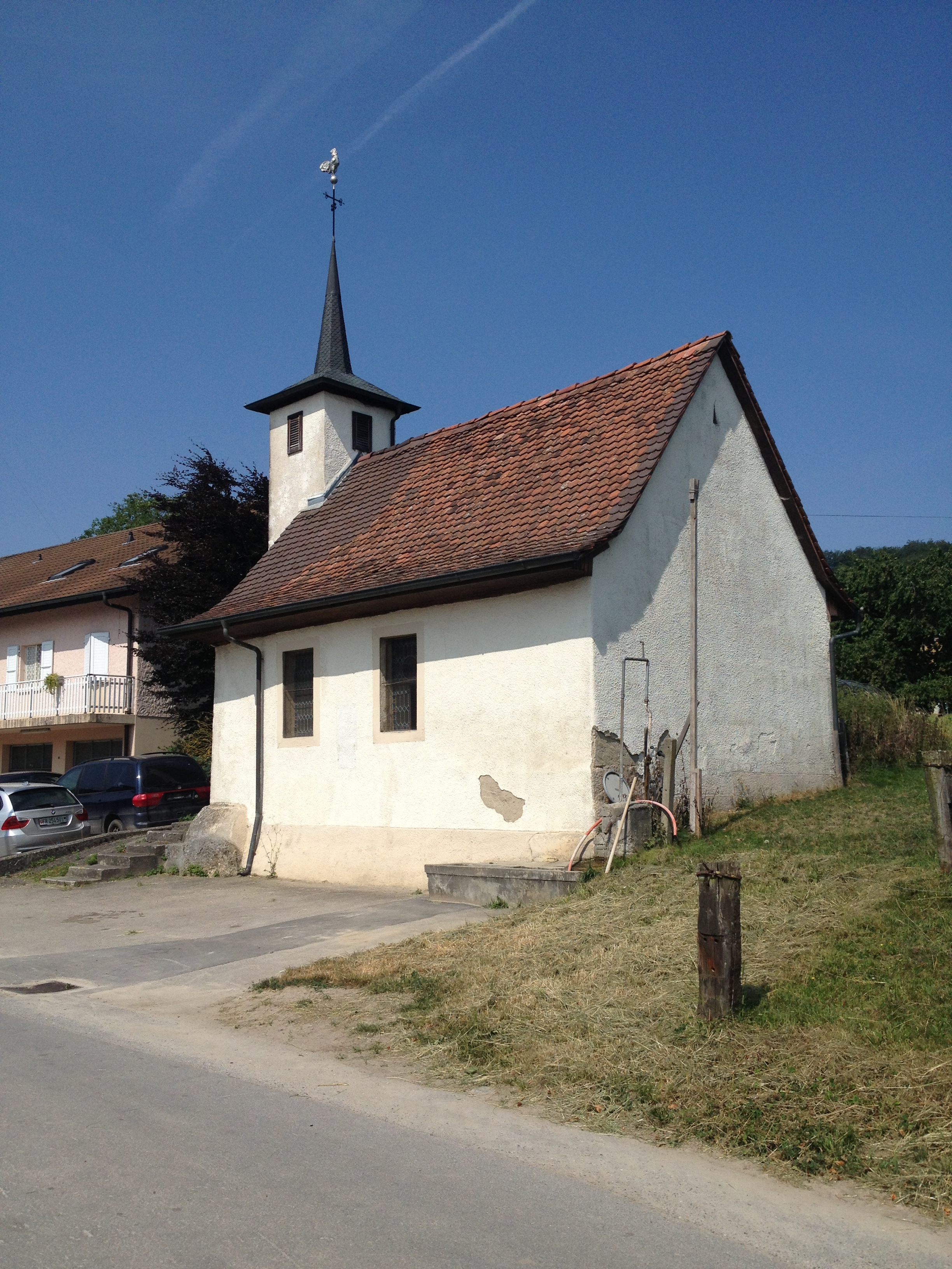 La chapelle de Chapelle dans la commune fribourgeoise de Cheiry en Suisse.